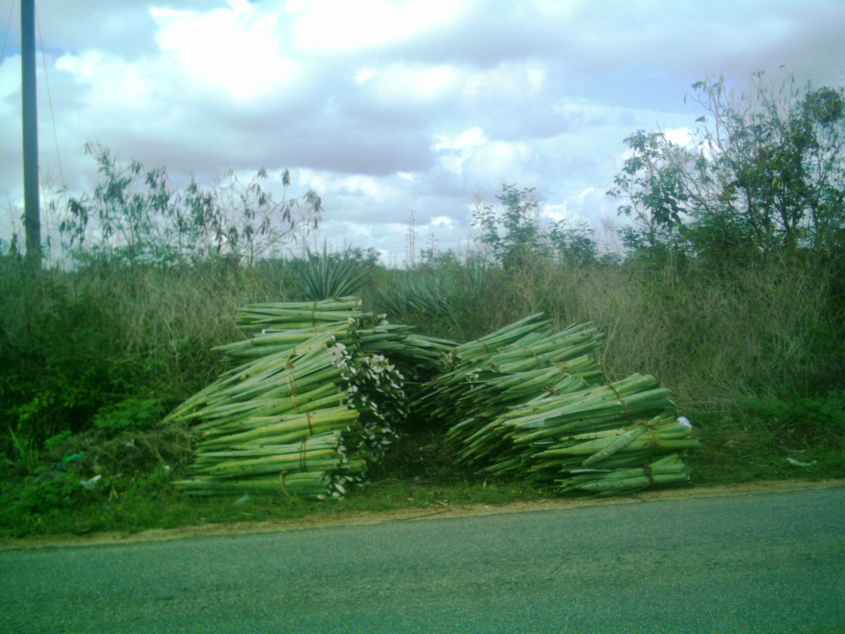 Hojas de henequén.